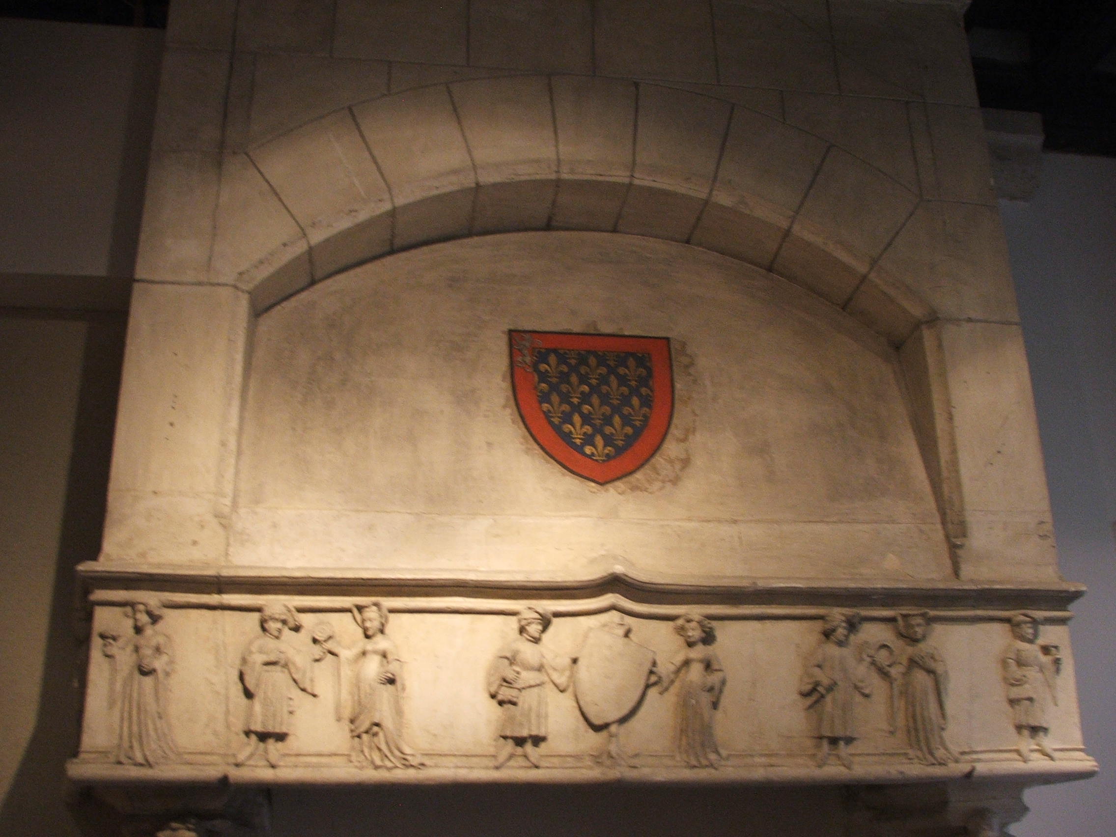 Blason du Maine au dessus d'une cheminée bourgeoise traditionnelle du Mans et du Maine avec des détails sculpturaux incrustés.